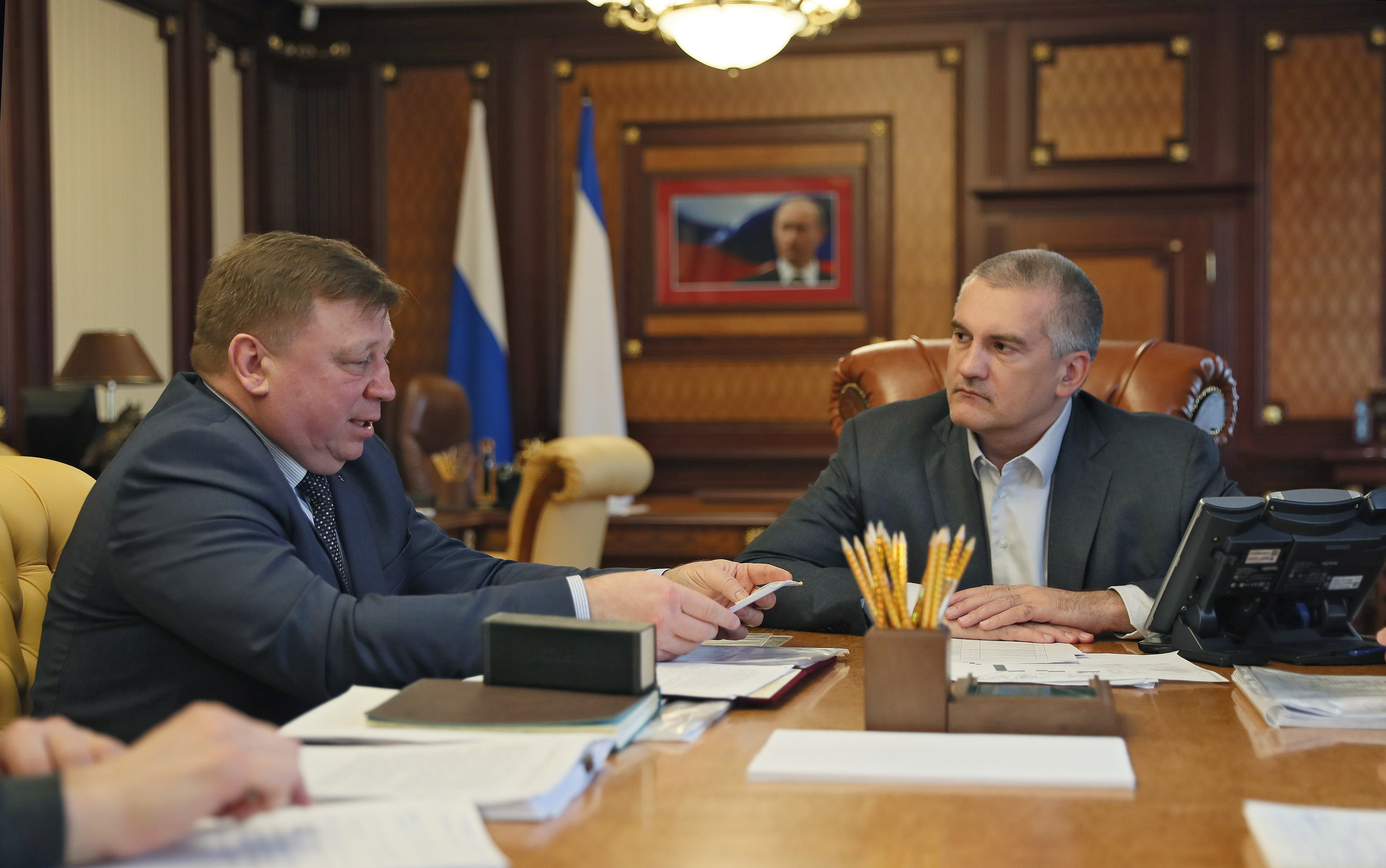 Глава Республики Крым Сергей Аксёнов провёл рабочую встречу с министром транспорта РК Игорем Захаровым, главой администрации города Симферополя Игорем Лукашевым, и его заместителем Сергеем Круцюком. В ходе встречи обсуждались вопросы оптимизации схемы движения транспорта в Симферополе, борьбы с пробками и расчета пассажиропотока.